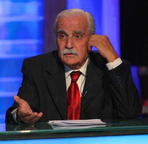 Slim Kallas